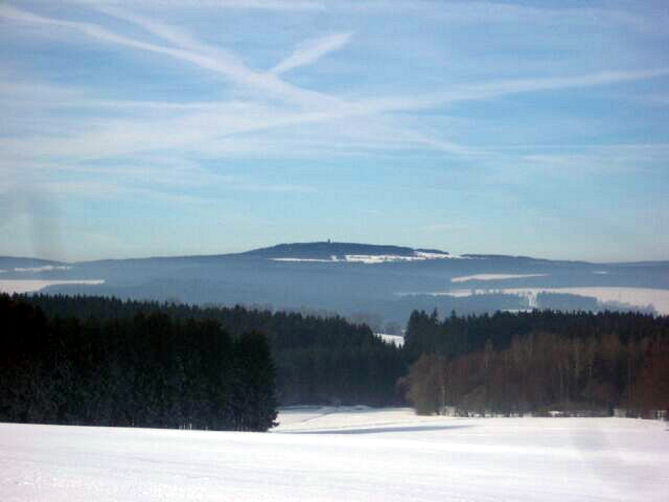 Blick auf den schneebedeckten Döbraberg von Osten.